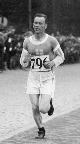 Olympische Spelen 1928 Amsterdam, Nederland. Atletiek, marathon. De Finse loper Marttelin op de voorgrond werd 3e, achter hem aan komt de Japanse Yamadi die 4e werd. Hier zijn ze op de terugweg naar het stadion.